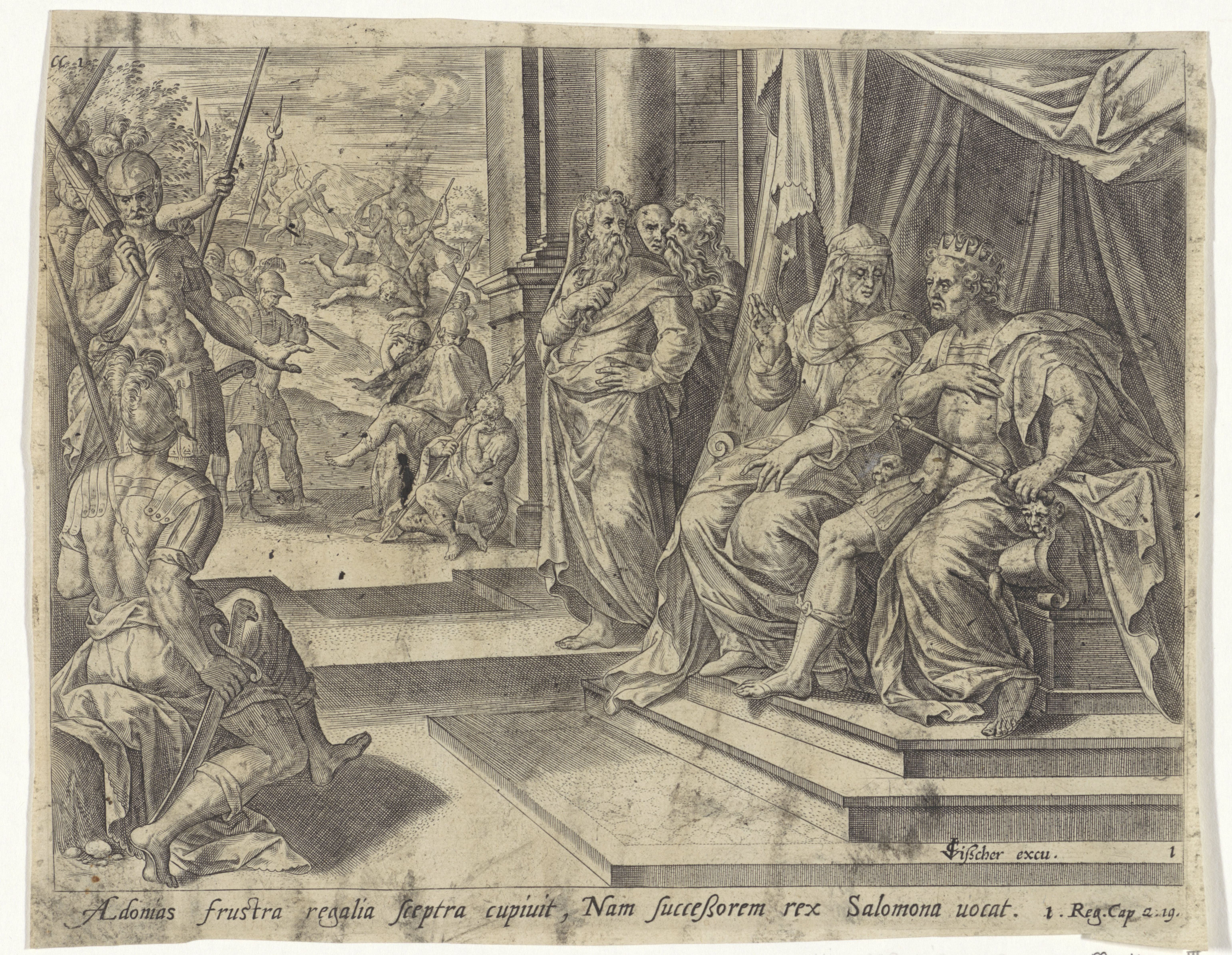 IdentificatieTitel(s): Batseba dient het verzoek van Adonia in bij SalomoGeschiedenis van Salomo (serietitel)Theatrum biblicum (...) (serietitel)Objecttype: prent Serienummer: 1/4Objectnummer: RP-P-OB-103.310Catalogusreferentie: Mielke 24-2(2)New Hollstein Dutch 49-3(3)Opmerking: staat 4(4), vier staten bekend aan de hand van de staten in het RijksmuseumOpschriften / Merken: verzamelaarsmerk, verso, gestempeld: Lugt 2228Omschrijving: Batseba zit aan de rechterhand van haar zoon, koning Salomo, en brengt de vraag van Salomo's broer Adonia aan hem over. Zij vraagt voor Adonia om de hand van Abisag. Salomo wordt woedend en geeft opdracht Adonia te doden. Op de achtergrond wordt Adonia met een lans doorstoken. Onder de voorstelling een verwijzing in het Latijn naar de Bijbeltekst in 1 Kon. 2:19. Linksboven gemerkt: cc1.VervaardigingVervaardiger: prentmaker: Hans Collaert (I) (toegeschreven aan)naar ontwerp van: Jan Snellinck (I)uitgever: Claes Jansz. Visscher (II) (vermeld op object)Plaats vervaardiging: AmsterdamDatering: 1579 en/of 1643Fysieke kenmerken: gravureMateriaal: papier Techniek: graveren (drukprocedé)Afmetingen: plaatrand: h 188 mm × b 243 mmToelichtingPrent gebruikt in: Theatrum biblicum : hoc est historiae sacrae veteris et novi testamenti tabulis aeneis expressae. Opus praesentatissimorum huius ac superioris seculi pictorum atque sculptorum, summo studio conquisitum et in lucem editum. Amsterdam: Claes Jansz. Visscher, 1643.OnderwerpWat: Solomon and BathshebaBathsheba brings Adoniah's request to SolomonAdoniah is killed by BenaiahVerwerving en rechtenVerwerving: onbekendCopyright: Publiek domein